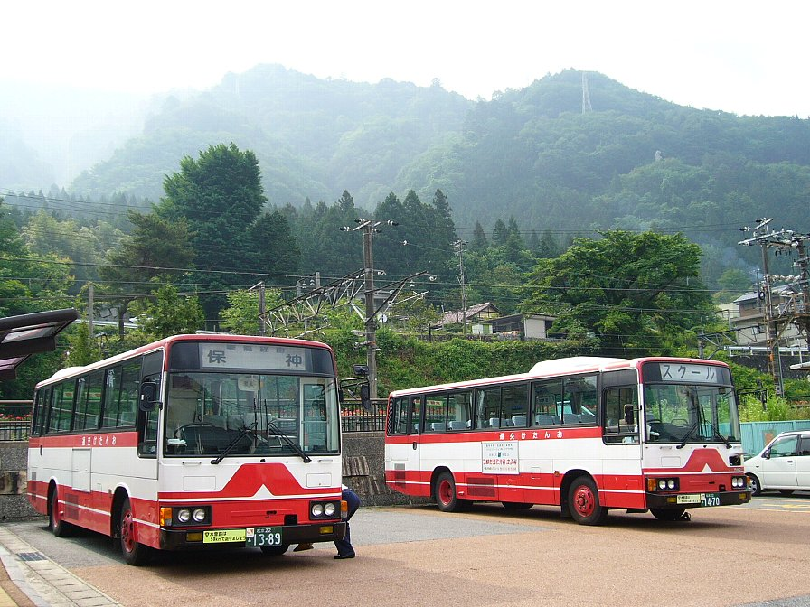 おんたけ交通バス 南木曽駅前にて